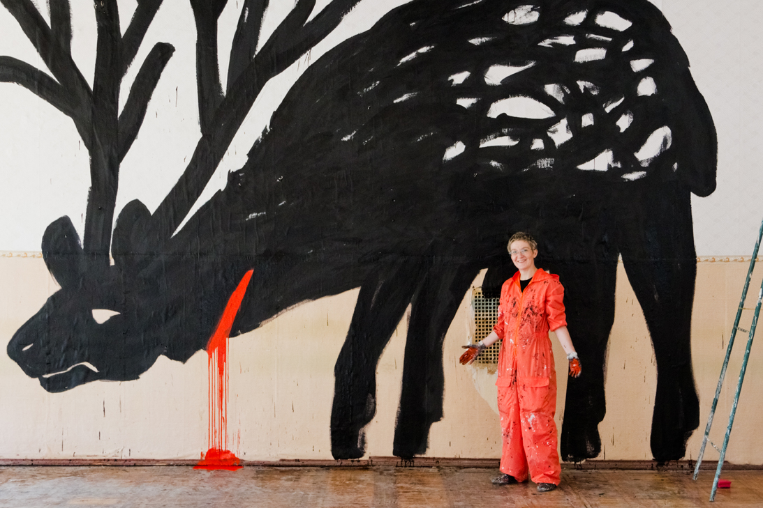 Настенная роспись "The End" Марины Колдобской. Санкт-Петербург. Фото Антона Хлабова. The End. Wall painting by Marina Koldobskaya. St. Petersburg. Photo by Anton Khlabov.